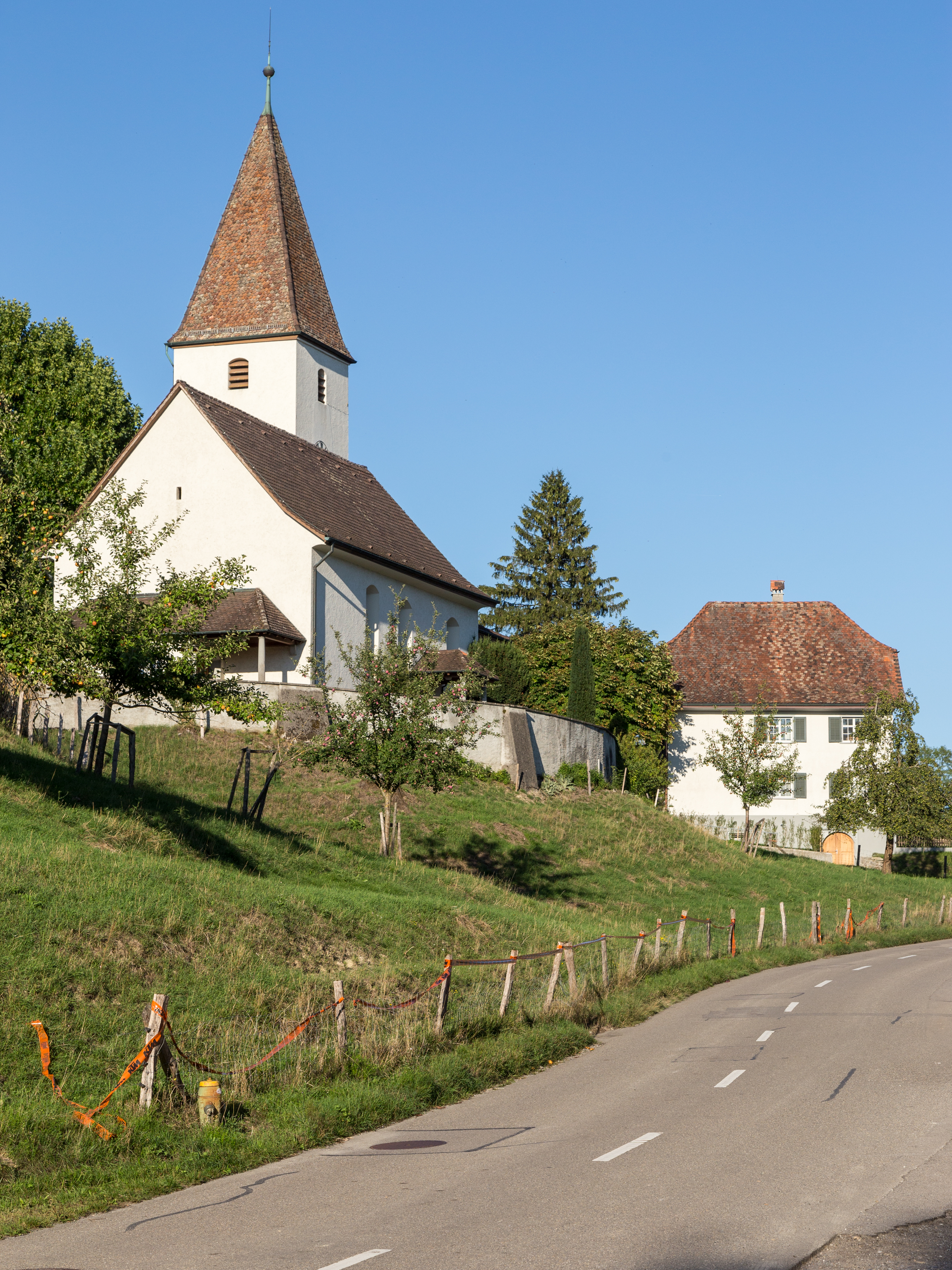 Reformierte Kirche und Pfarrhaus in Lipperswil